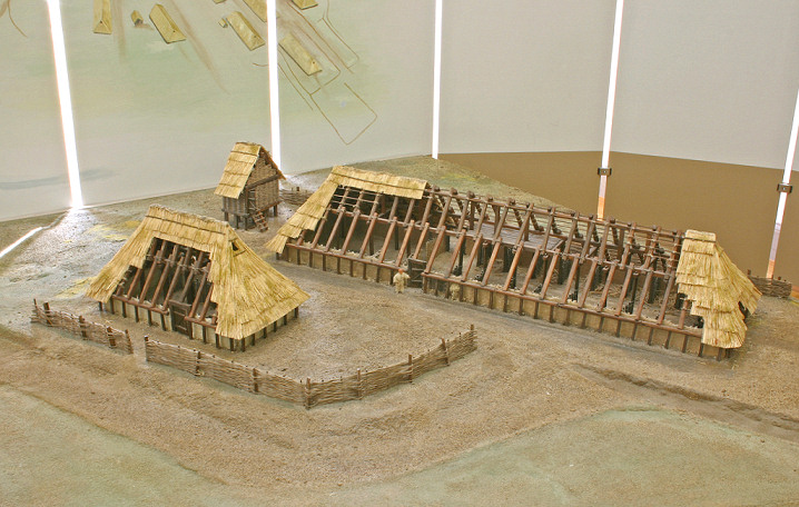 Hofmodell Feddersen Wierde, ausgestellt im Niedersächsischen Landesmuseum Hannover, vom Museum übersandt an Benutzer AxelHH zur Verfügung gestellt als PD nach Rückfrage.